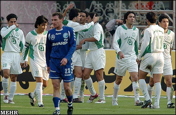 گزارش بازی